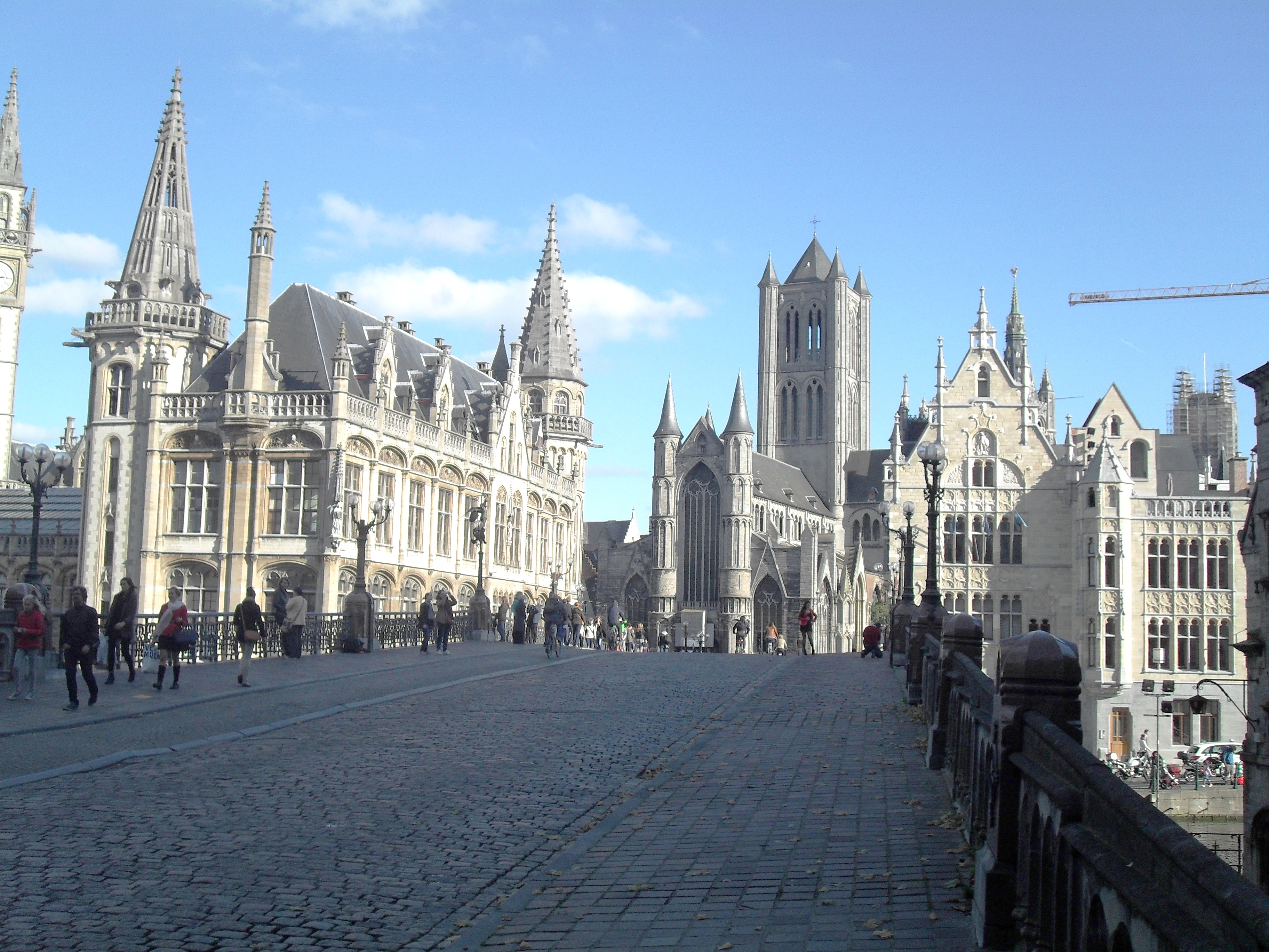 Blick auf die drei Türme der Stadt Gent (St.-Niklas-Kirche, Belfried, St.-Bavo-Kathedrale) als stumme Zeugen einstiger Macht von der St.-Michaelsbrücke aus gesehen